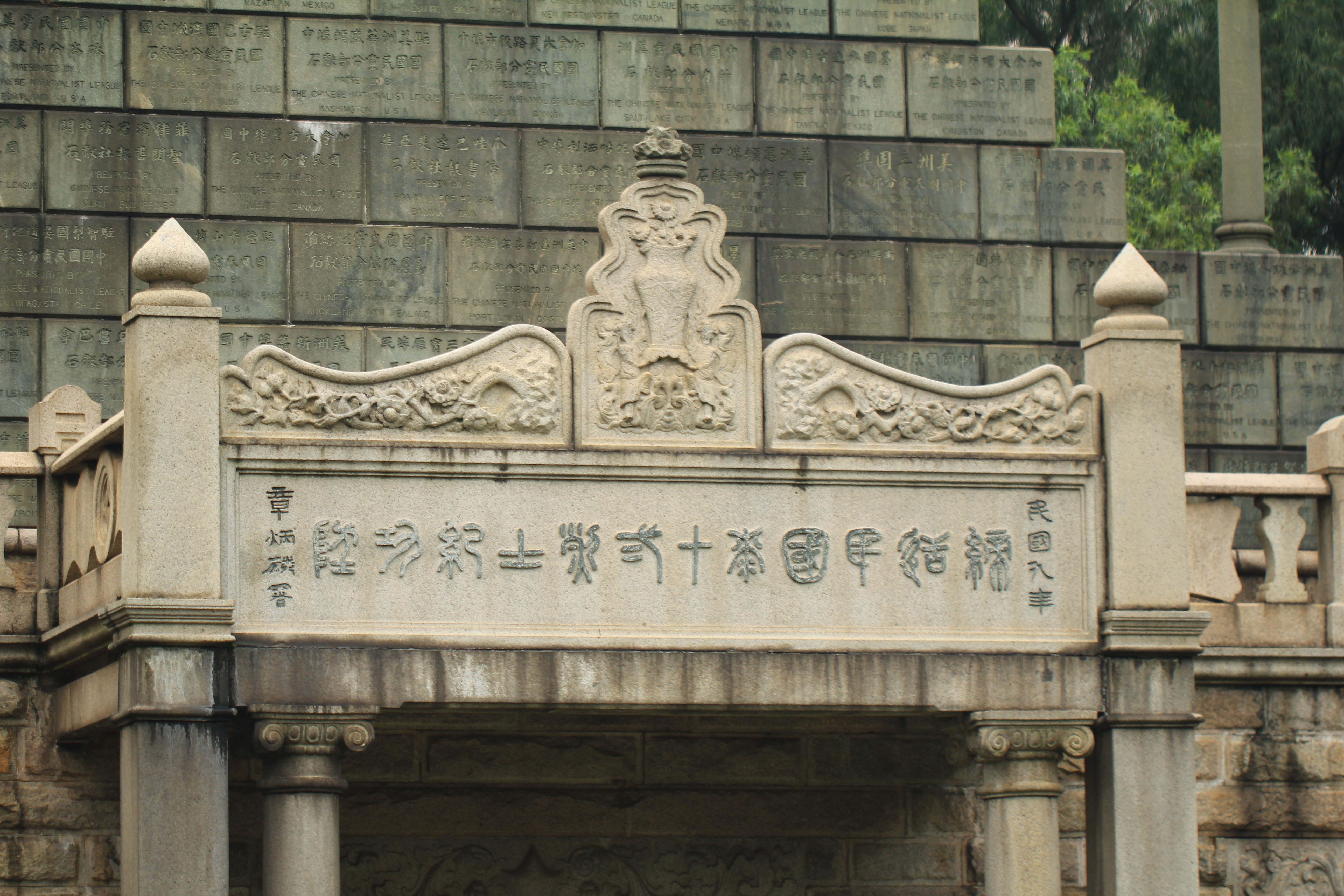 紀功坊橫額，章炳麟書。